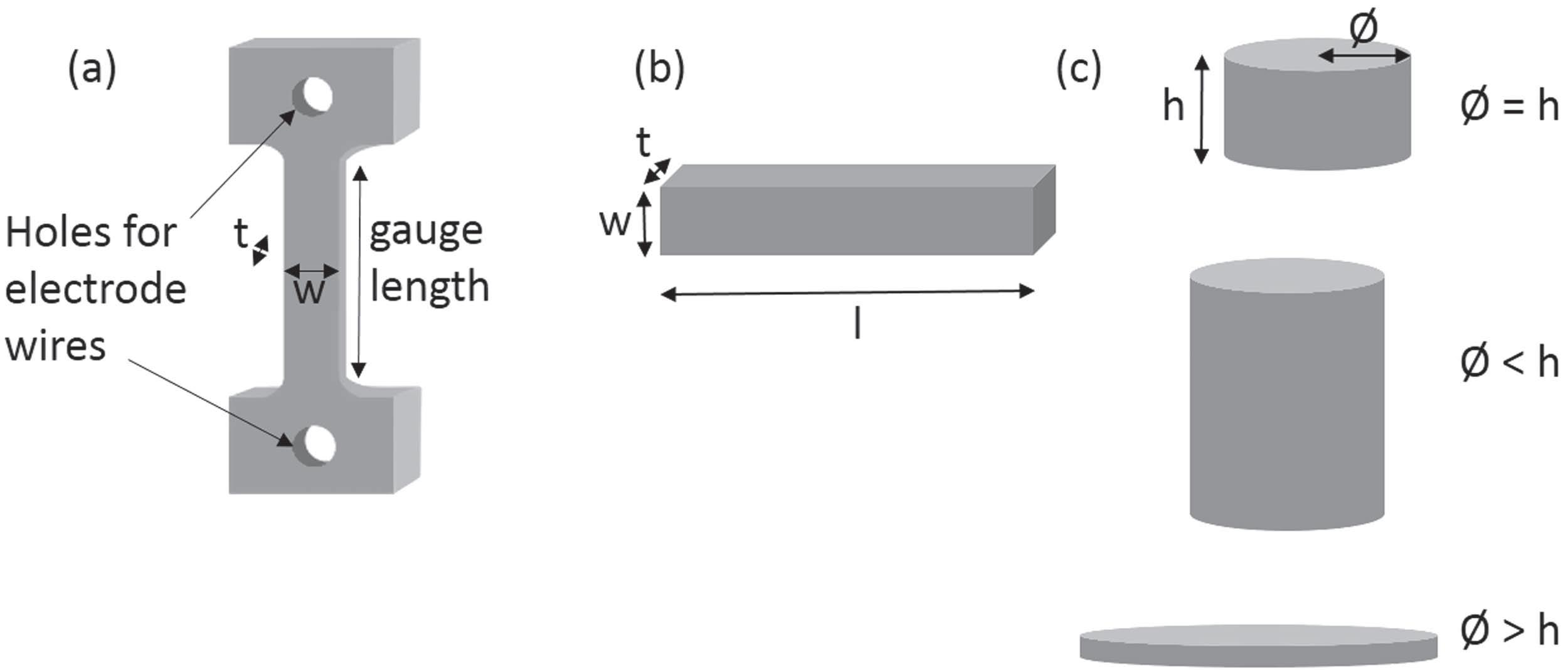 هندسه¬ی قطعات مورد استفاده در فلش زینتر